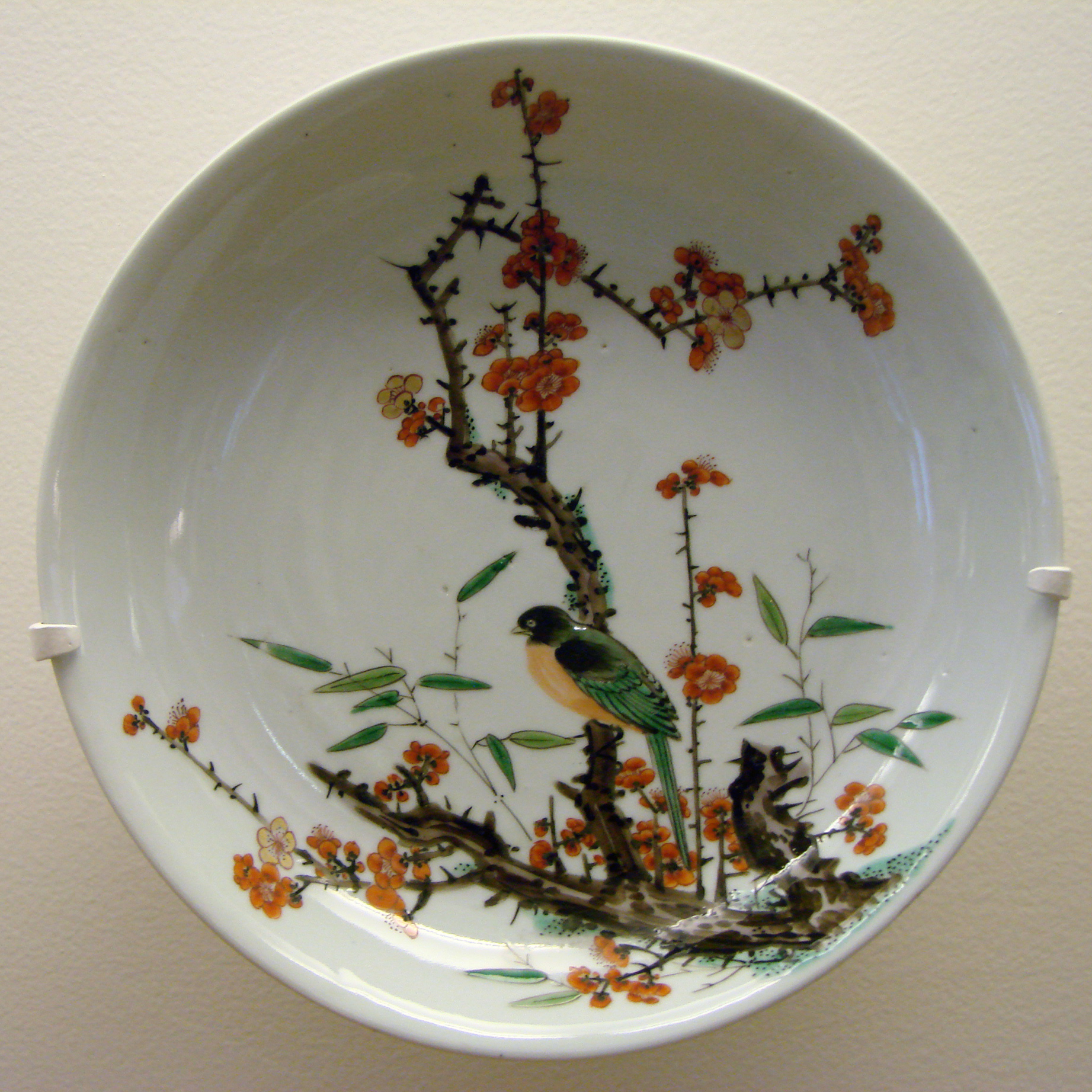 Plat, dynastie Qing, période Kangxi (1662-1722). Musée Guimet, Paris.